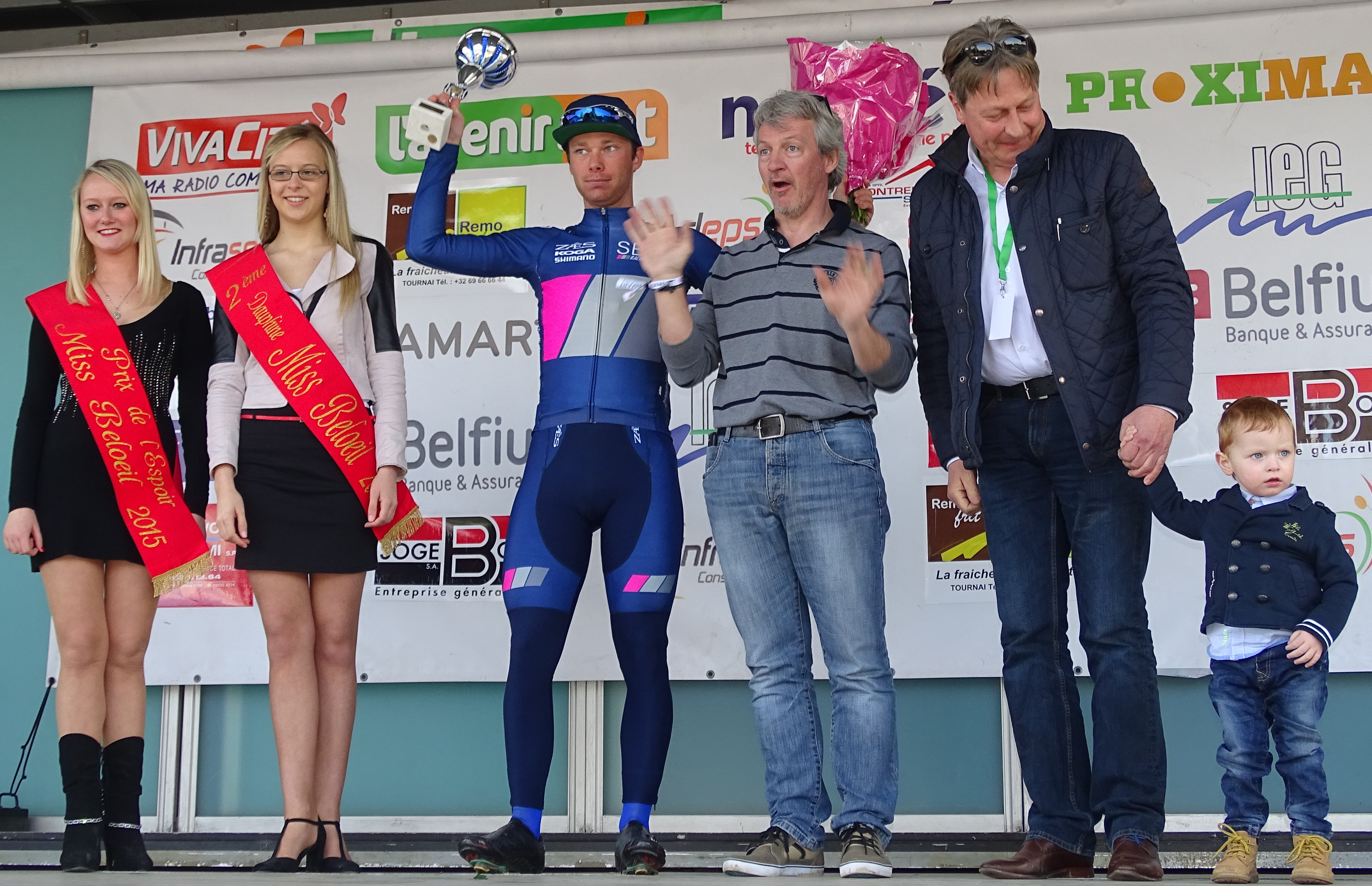 Triptyque des Monts et Châteaux 2015 Depicted team: SEG Racing